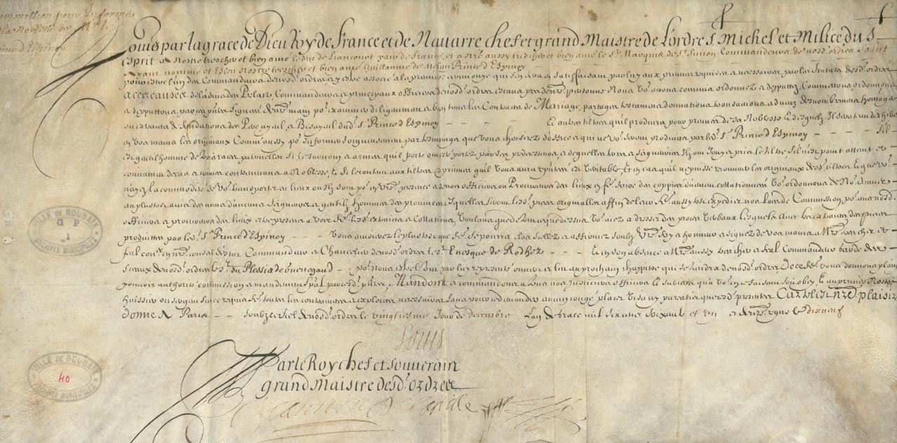 Commission donnée par Louis XIV au duc de Liancourt et au marquis de Saint Simon pour informer de la noblesse de Guillaume de Melun, prince d'Espinoy, en vue de sa nomination au grade et dignité de commandeur de l'Ordre de Saint Michel et de la Milice du Saint Esprit. Document présentant la signature de Louis XIV.